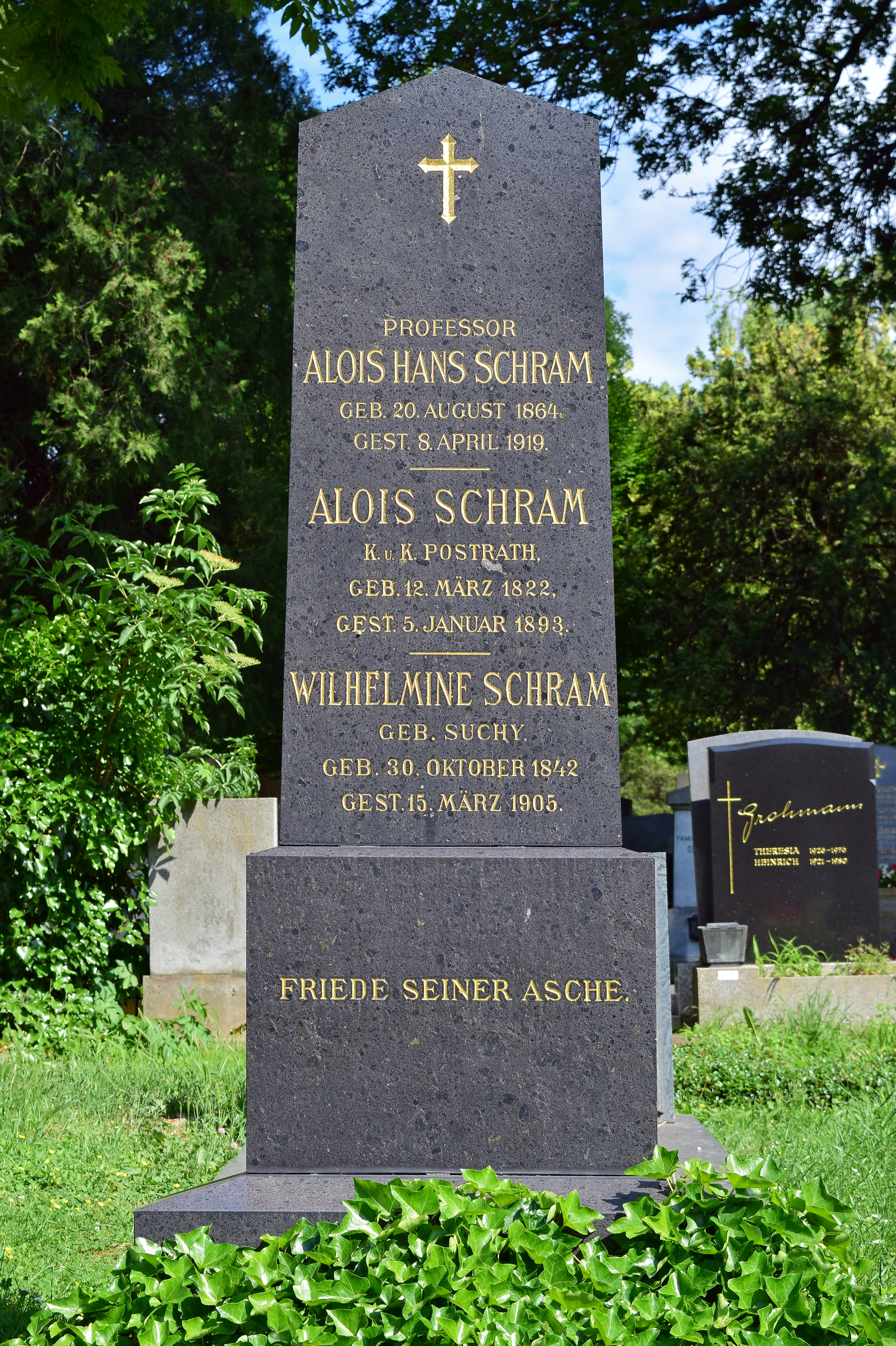 Ehrenhalber gewidmetes Grab von Alois Hans Schram auf dem Wiener Zentralfriedhof.